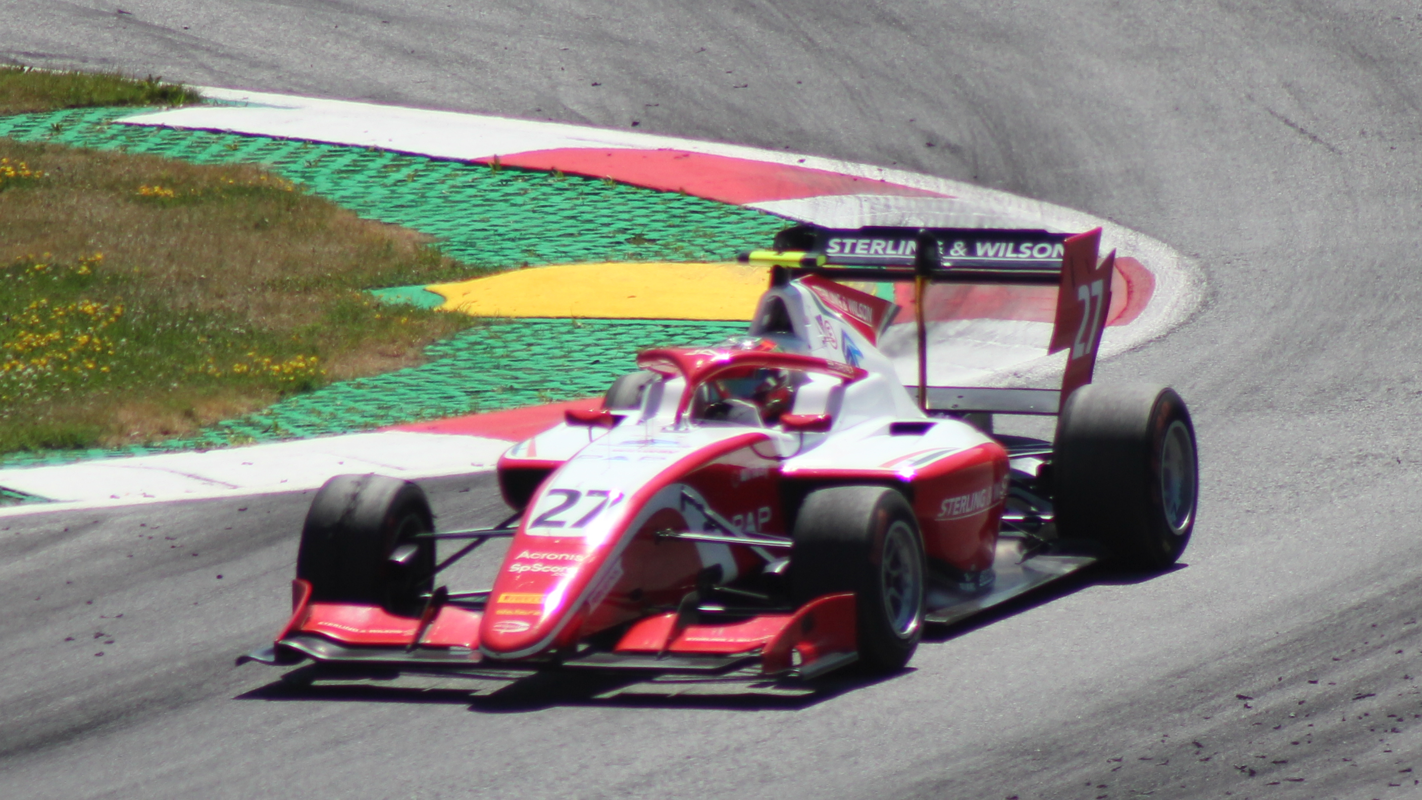 Daruvala beim Rennwochenende in Österreich 2019